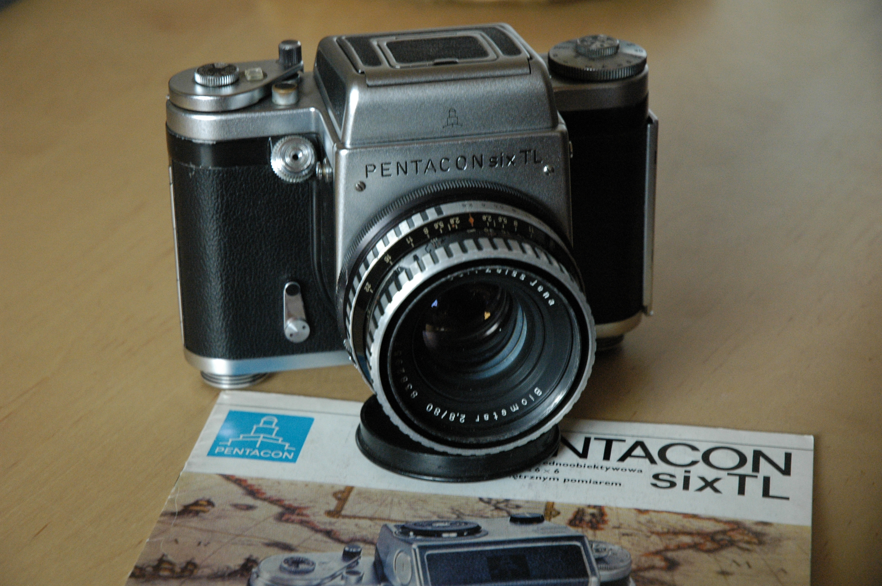 Aparat fotograficzne Pentacon six TL film (6x6)